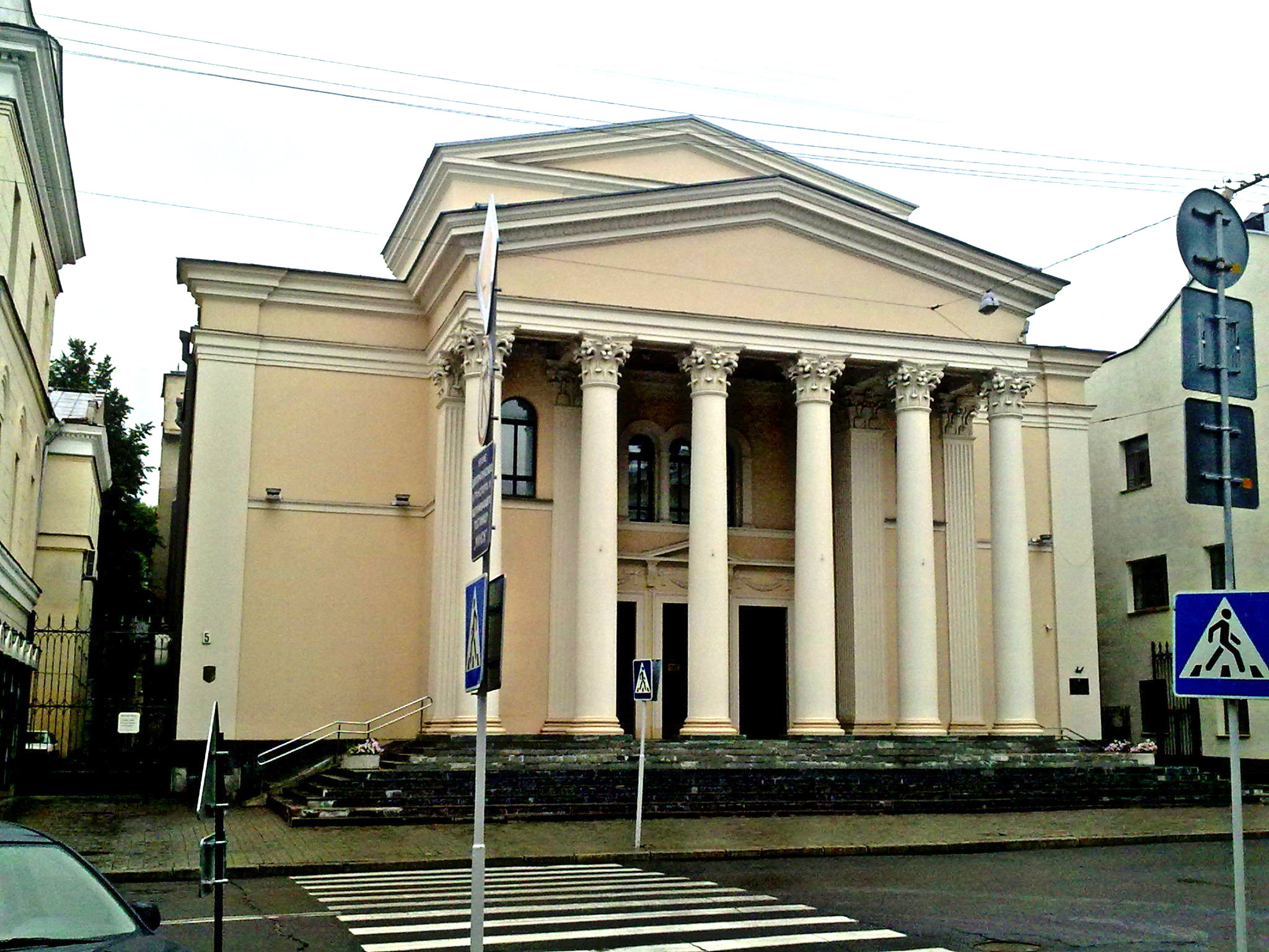 Будынак Нацыянальнага драматычнага тэатра імя М. Горкага. г. Мінск This is a photo of Belarusian heritage monument. Reference number: 713Г000020 ( WLM)